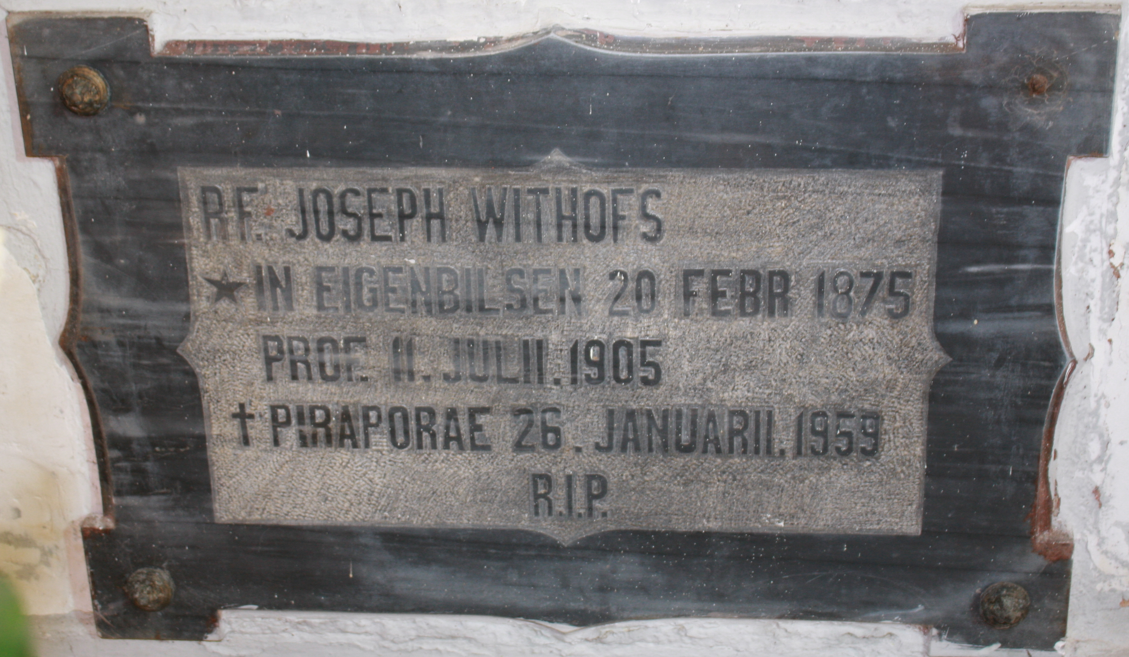 lápide tumular de Godfried Withofs (1875-1959) religioso e artista plástico belga, cripta do Seminário Premonstratense em Pirapora do Bom Jesus.